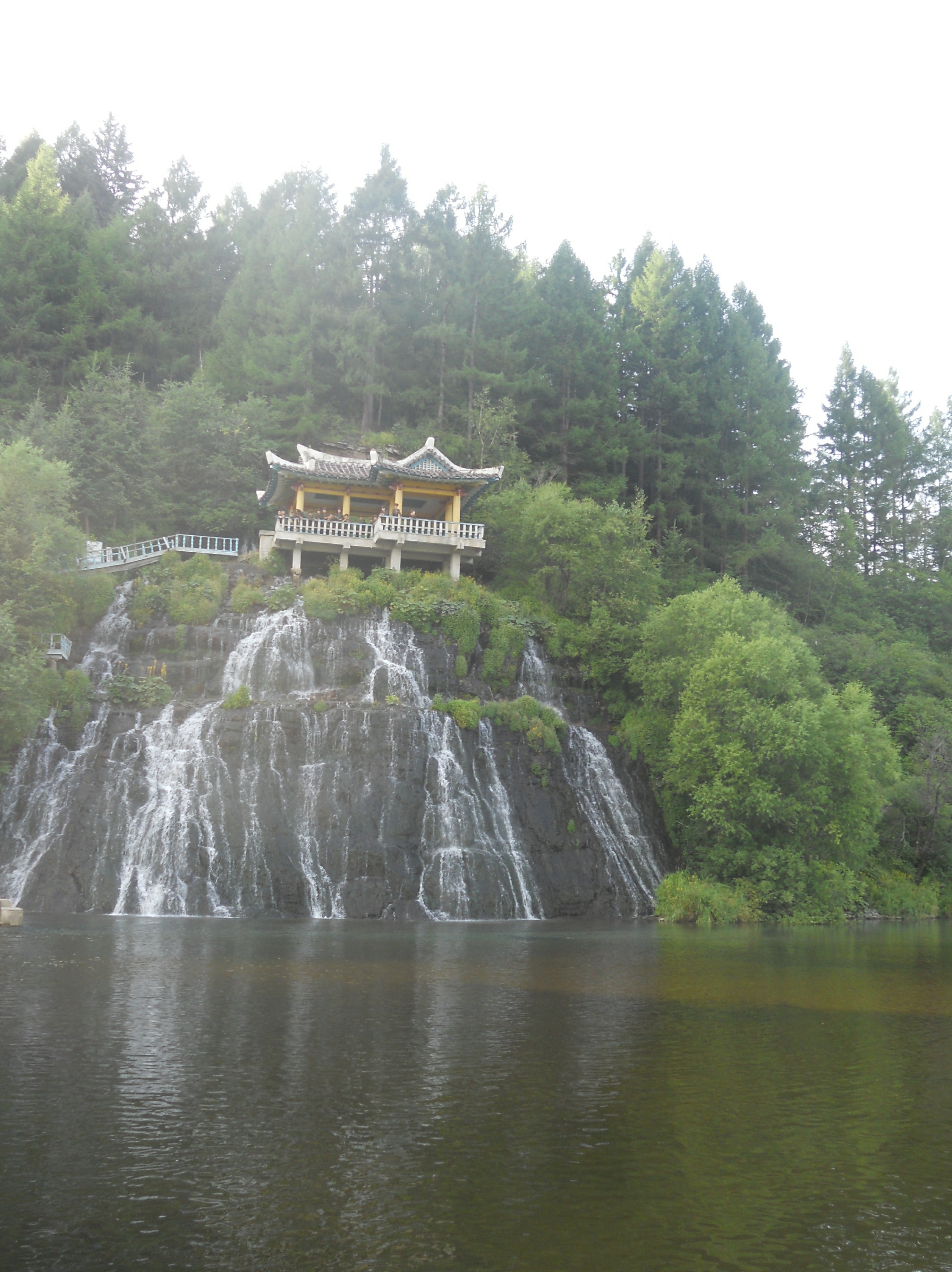 Rimyongsu Waterfalls